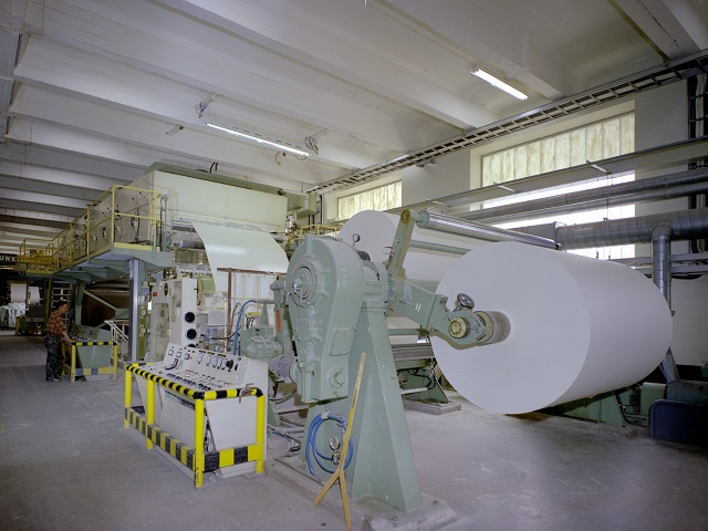 Haarlan paperikone vuonna 1973.